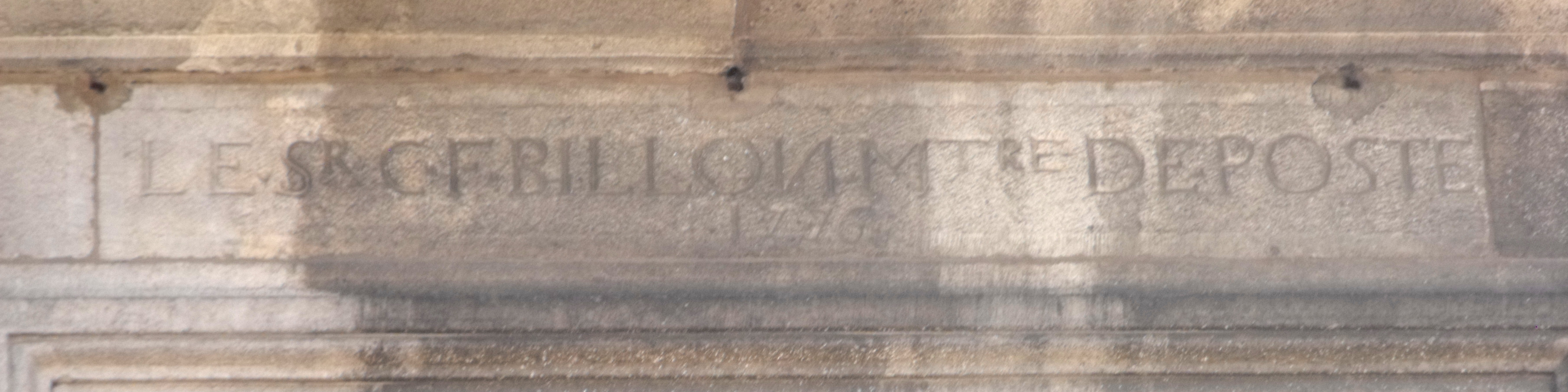 Hôtel du maitre de poste - Saint Vit, Doubs, France